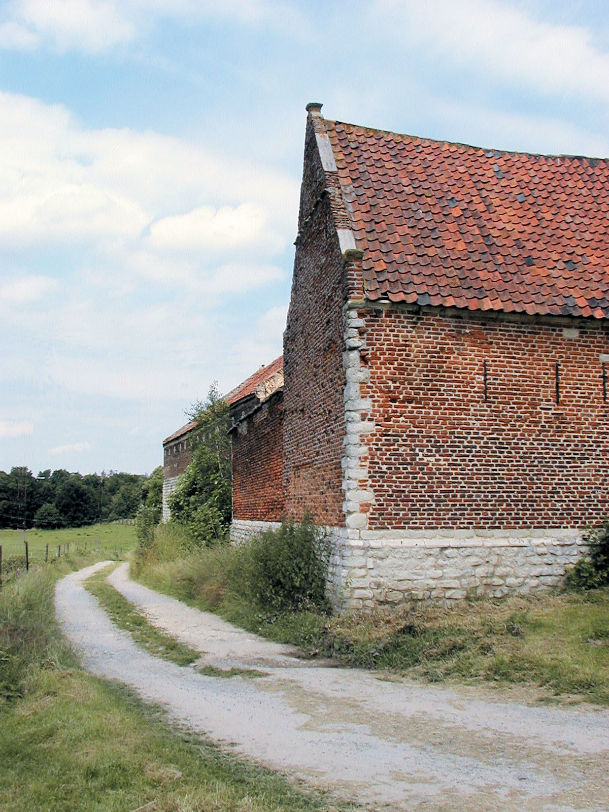 Photo personnelle de Licensing Description Photo de la façade ouest de la ferme d'Hougoumont DateMay 2008SourceOwn work by the original uploaderAuthorfr:Utilisateur:MicharlemagnePermission(Reusing this file) Publié sous licence Photo de la façade ouest de la ferme d'Hougoumont